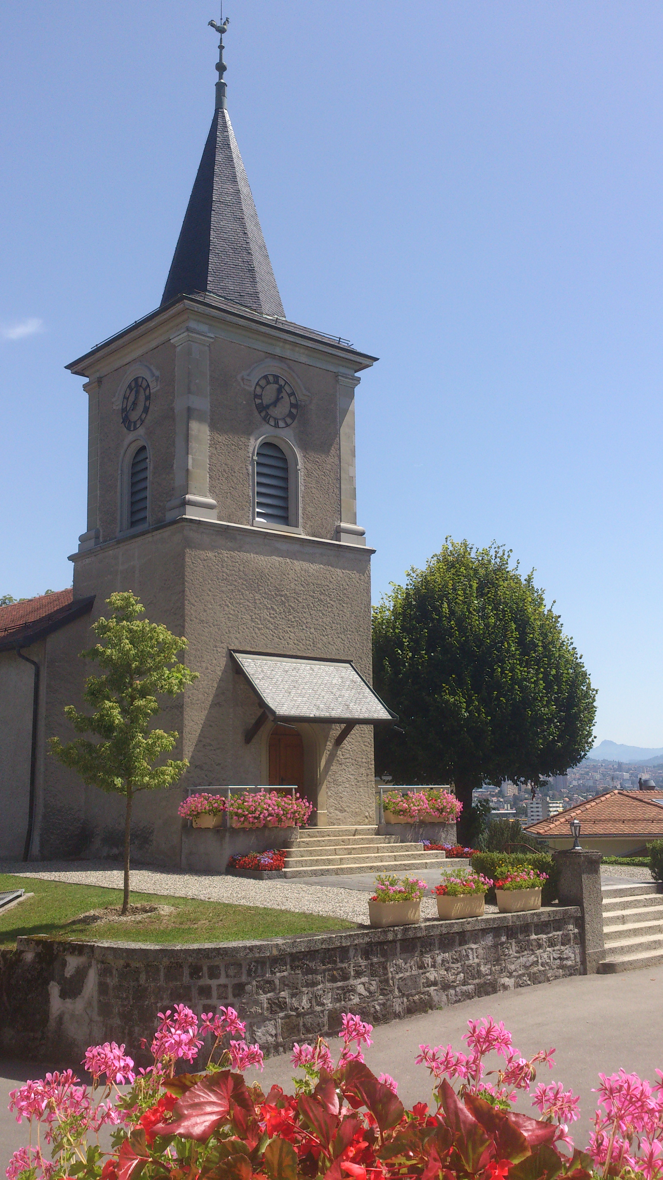 Ecublens